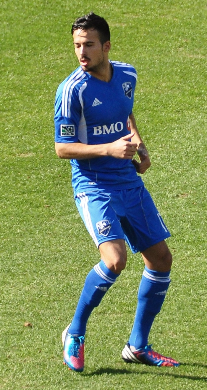 Impact de Montréal vs Chicago Fire